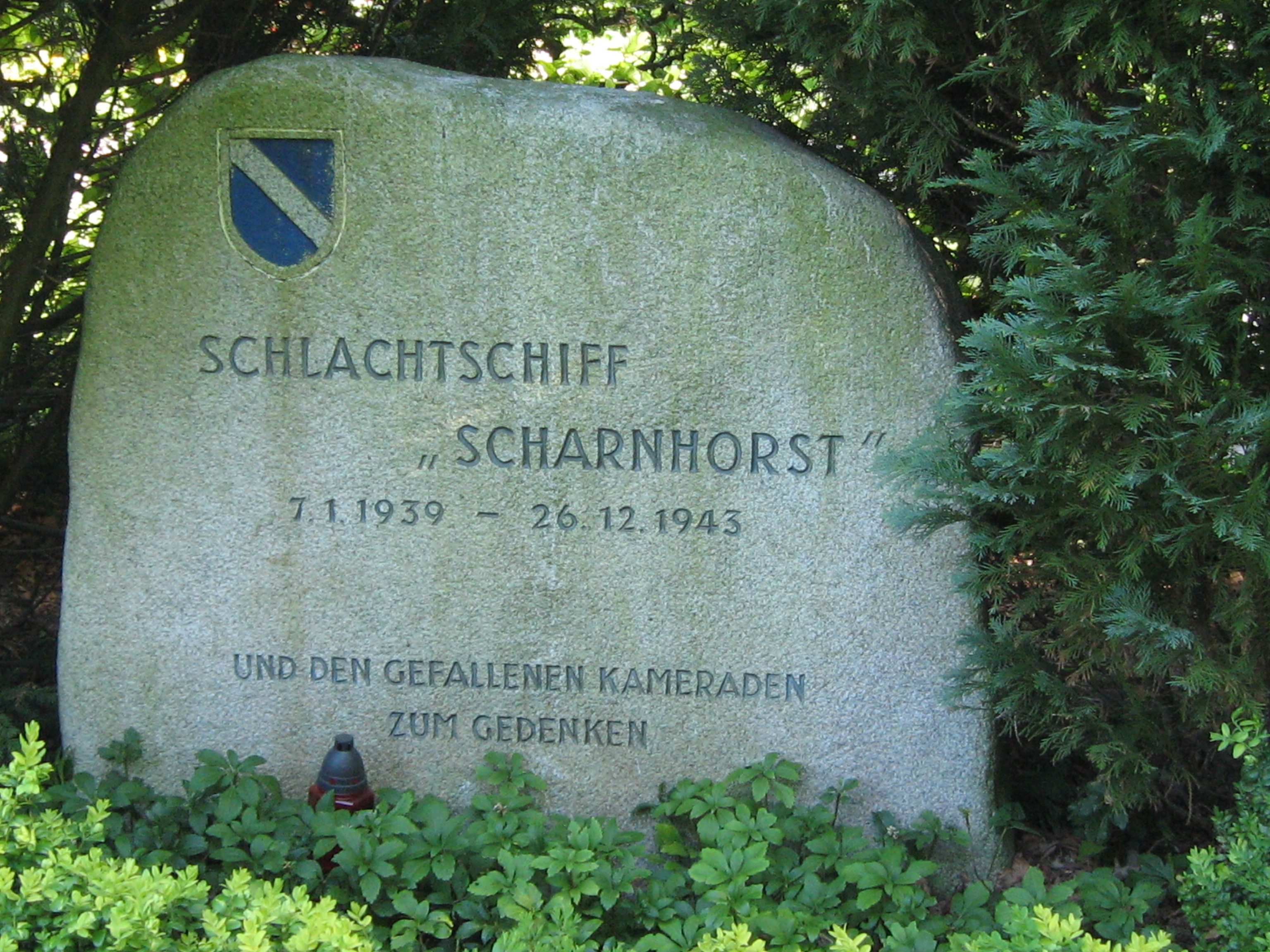 Gedenkstein für die Gefallenen des Schlachtschiffs Scharnhorst